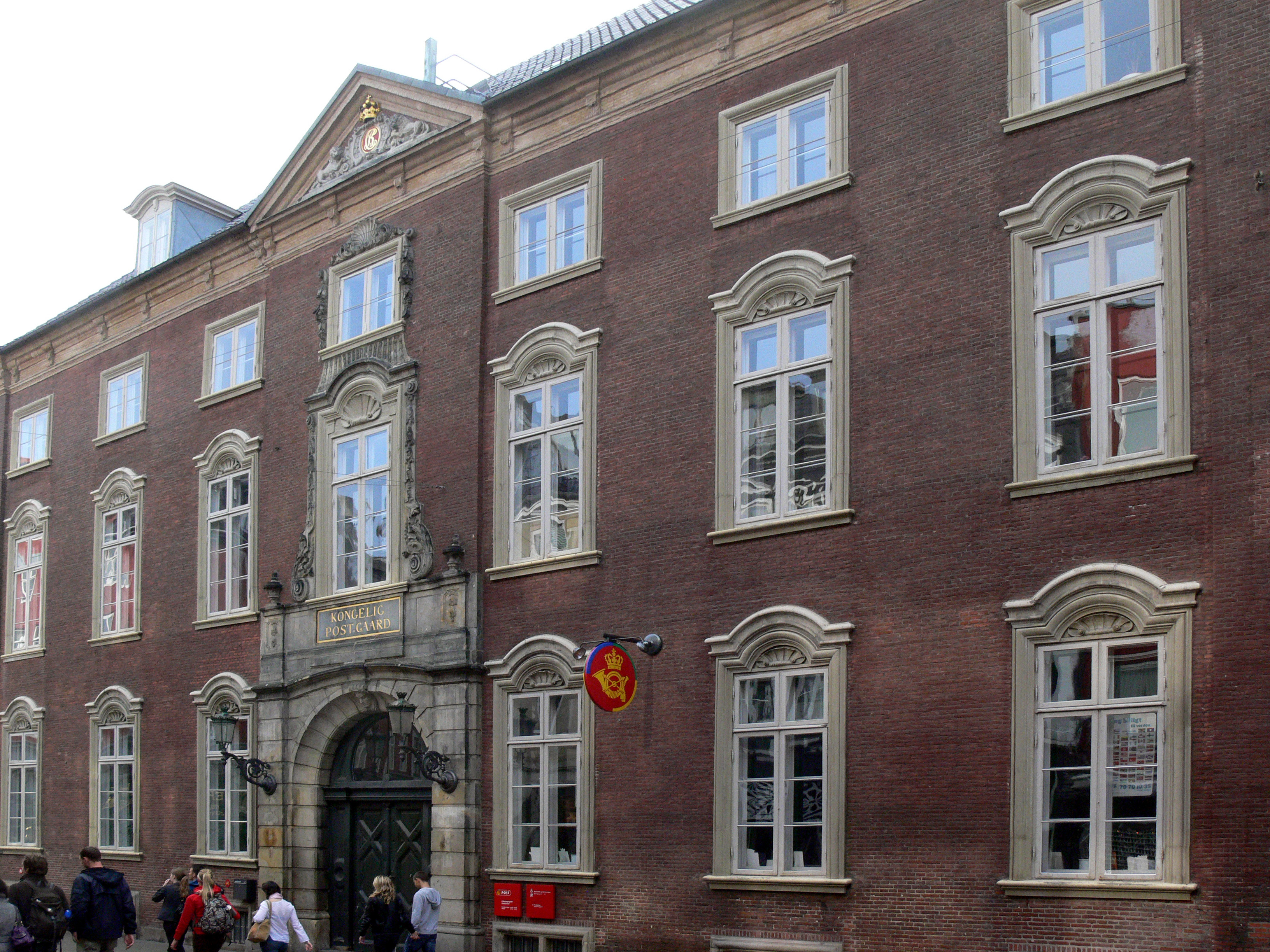 Post in der Købmagergade in Kopenhagen